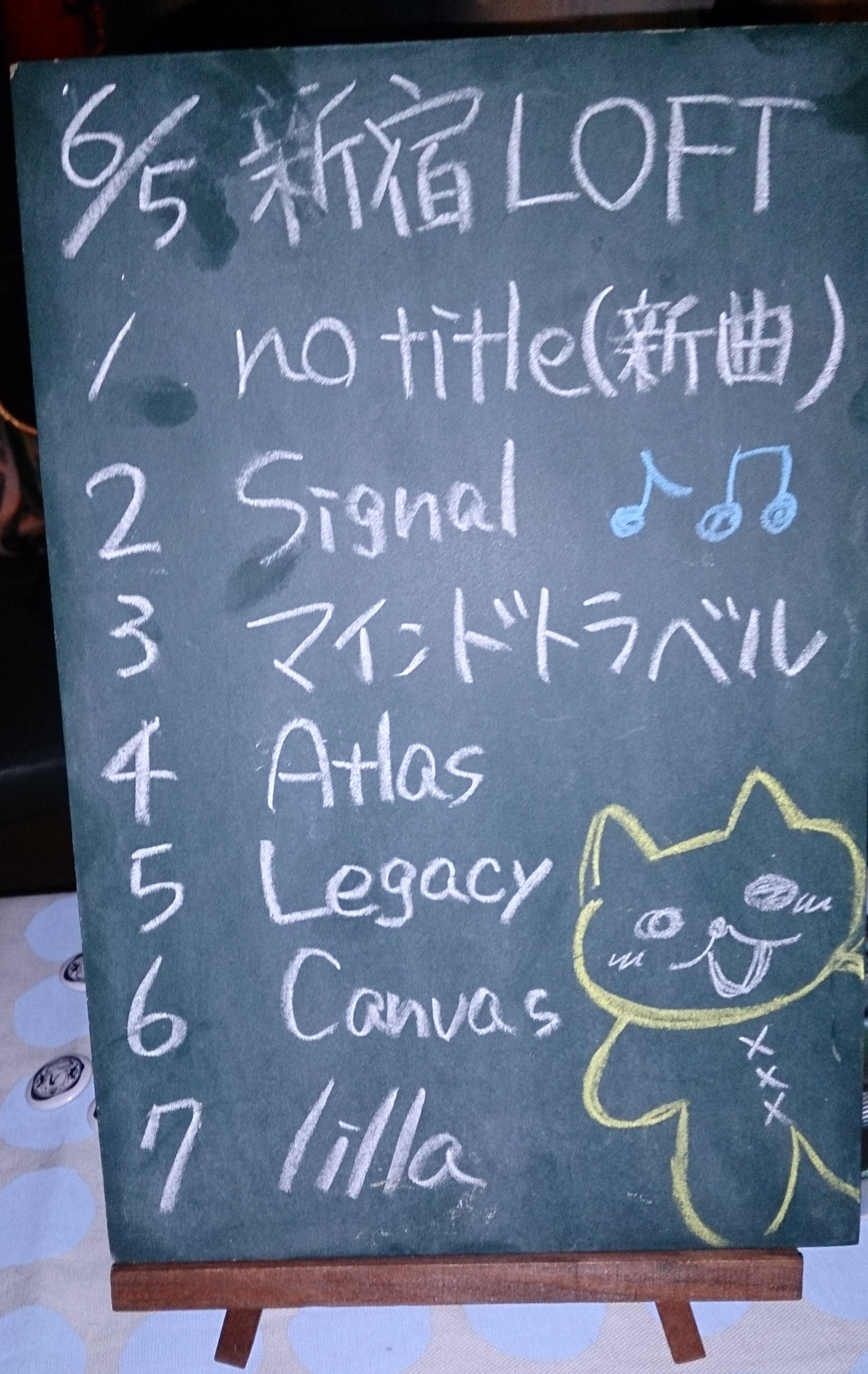 amiinAセトリボード(20160605(1))